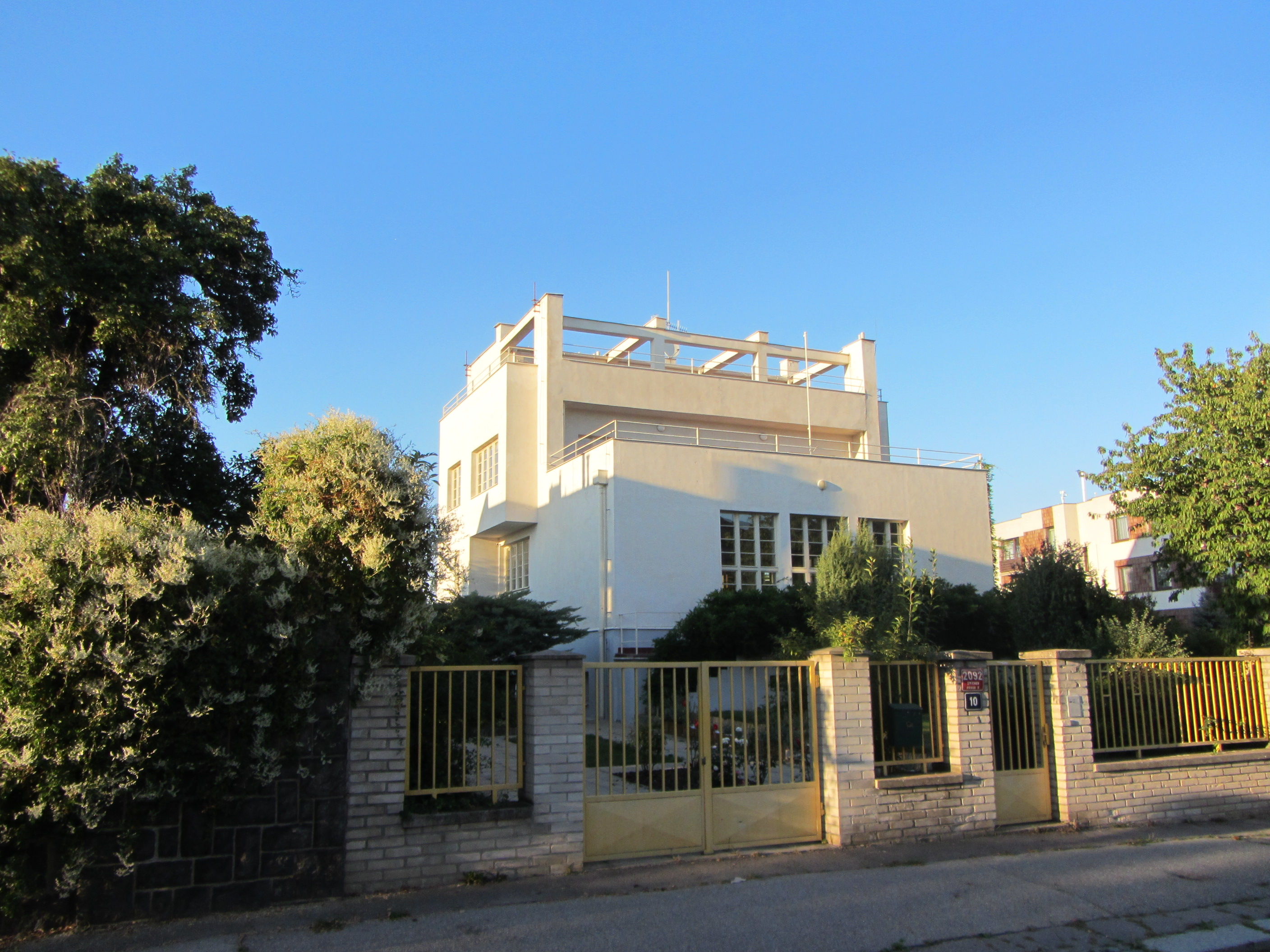 Vila (Smíchov), Praha 5, Na Cihlářce 2092/10, Smíchov